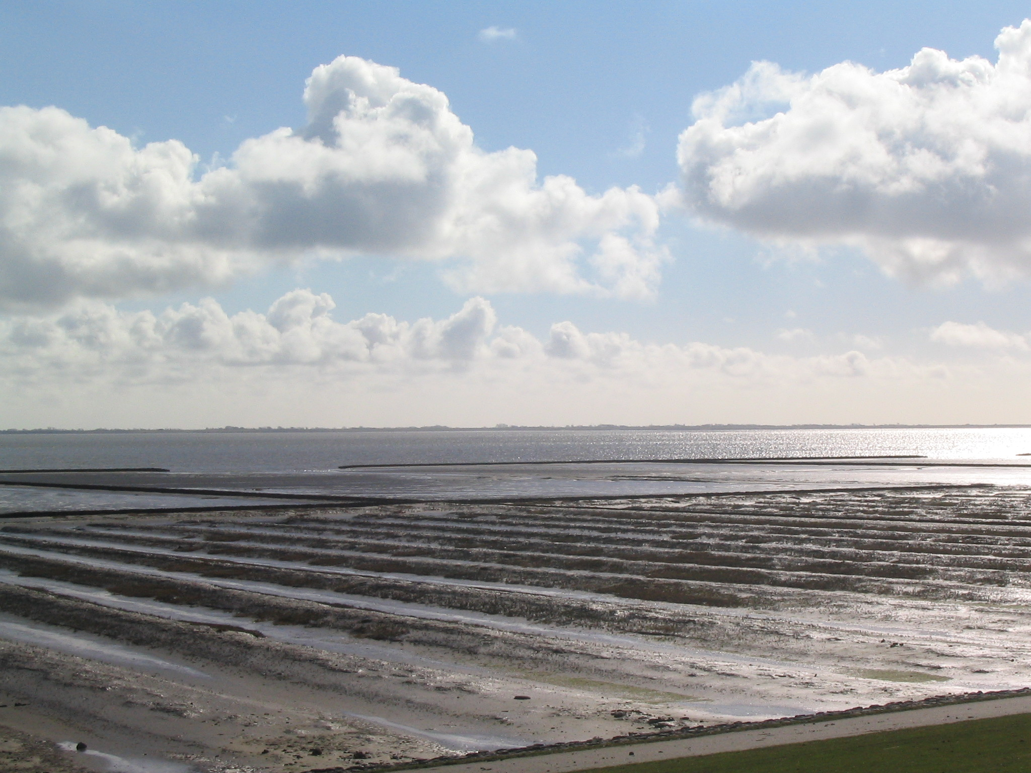 Dike on Nordstrand